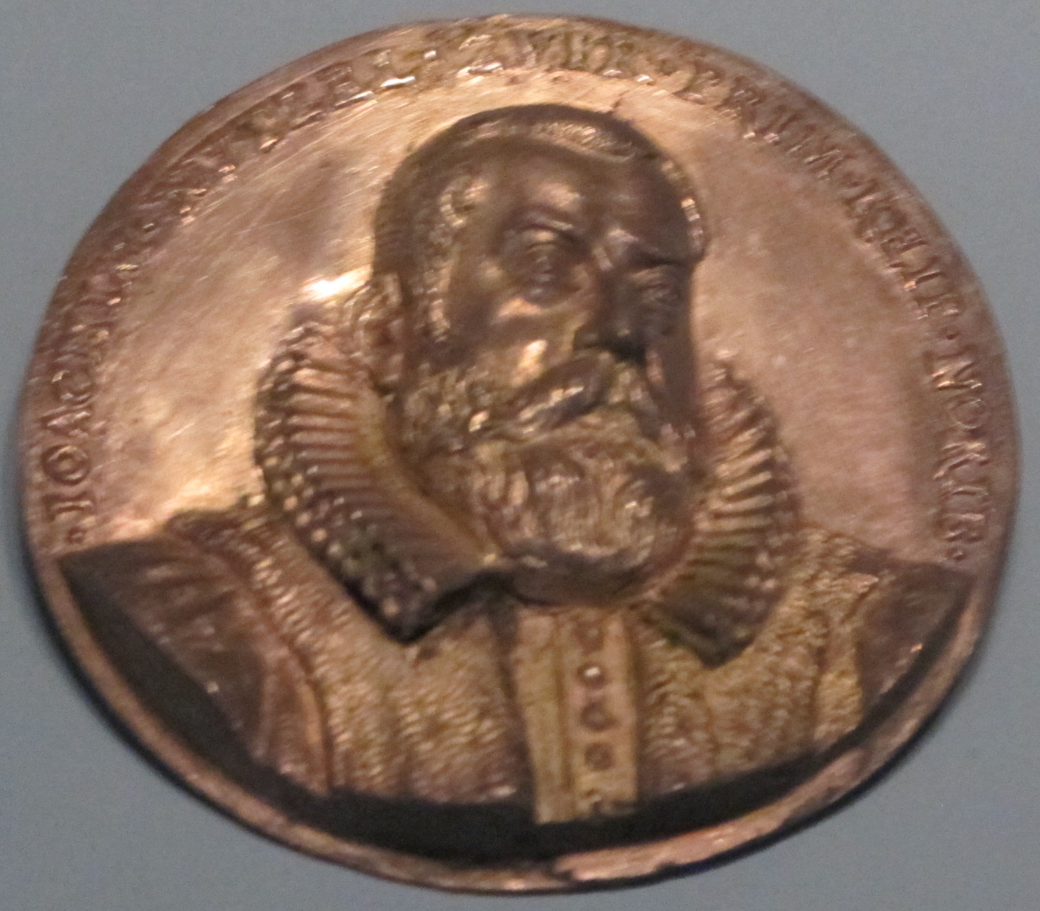 Johann philipp von der pütt, med di joachim nützel, norimberga 1601-1602